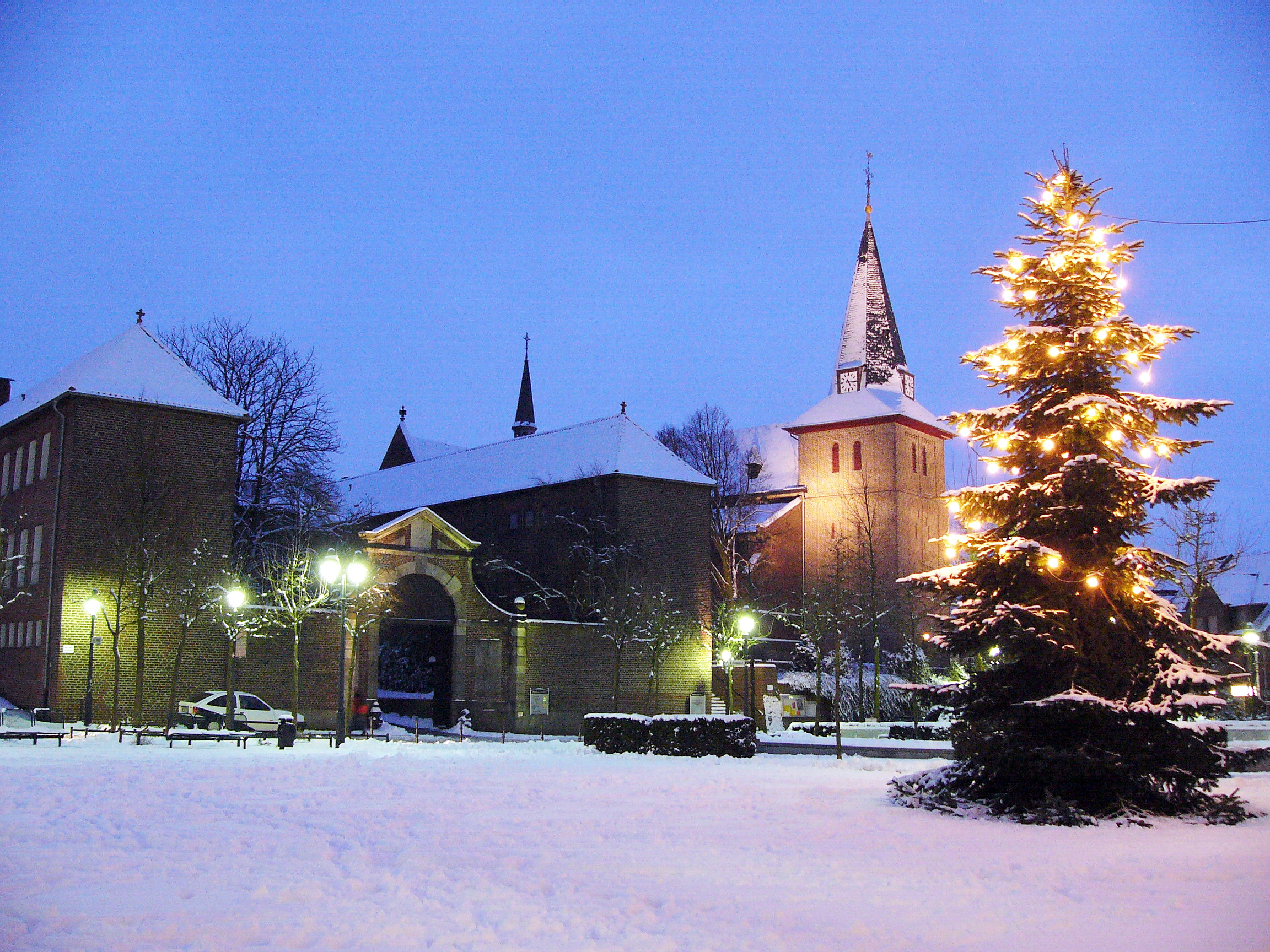 Wegberg, Rathausplatz mit Pfarrkirche und ehem. Kreuzherrenkloster zur Weihnachtszeit